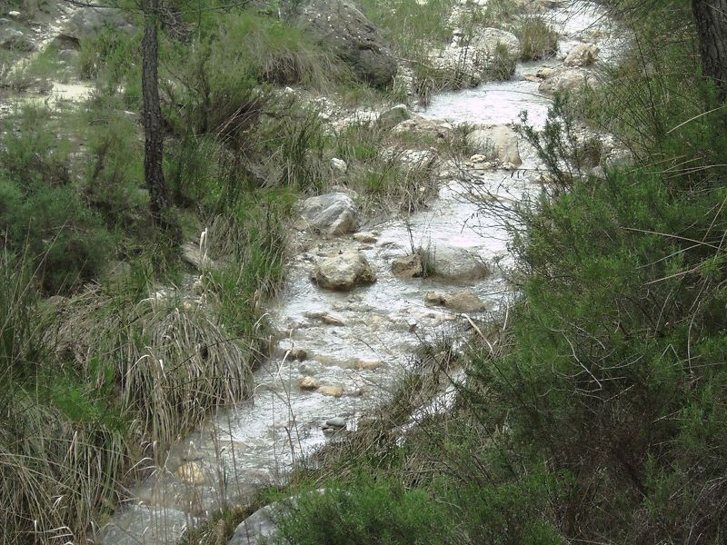 Moratalla, Murcia, España. Río Benamor entre Casas de Benamor y los embalses de riego, en un año de lluvia. -- Moratalla, Murcia, Spain, river Benamor.